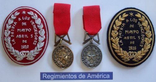 Escudos honoríficos y medallas otorgadas a las tropsa del Ejército Unido tras la victoria. Réplicas realizadas por